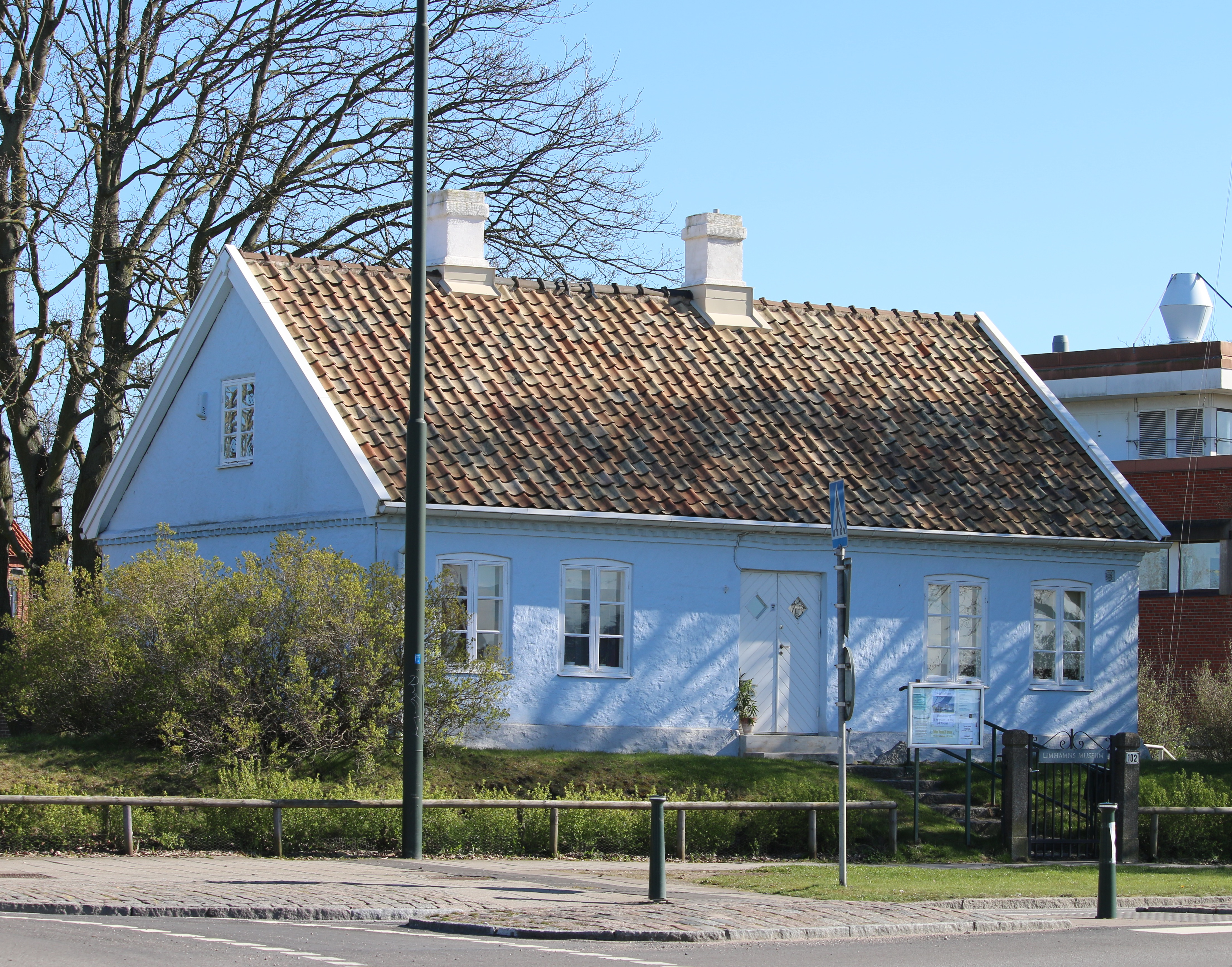 Limhamns museum 2017